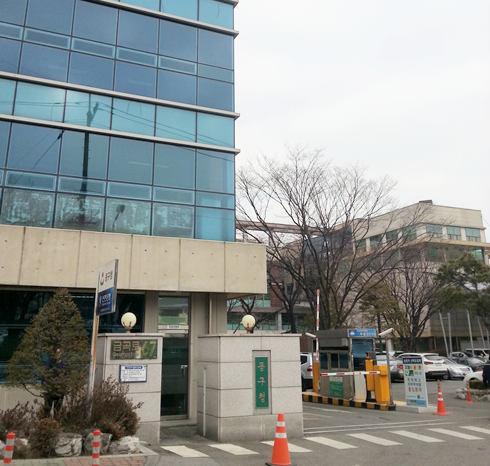 동구청